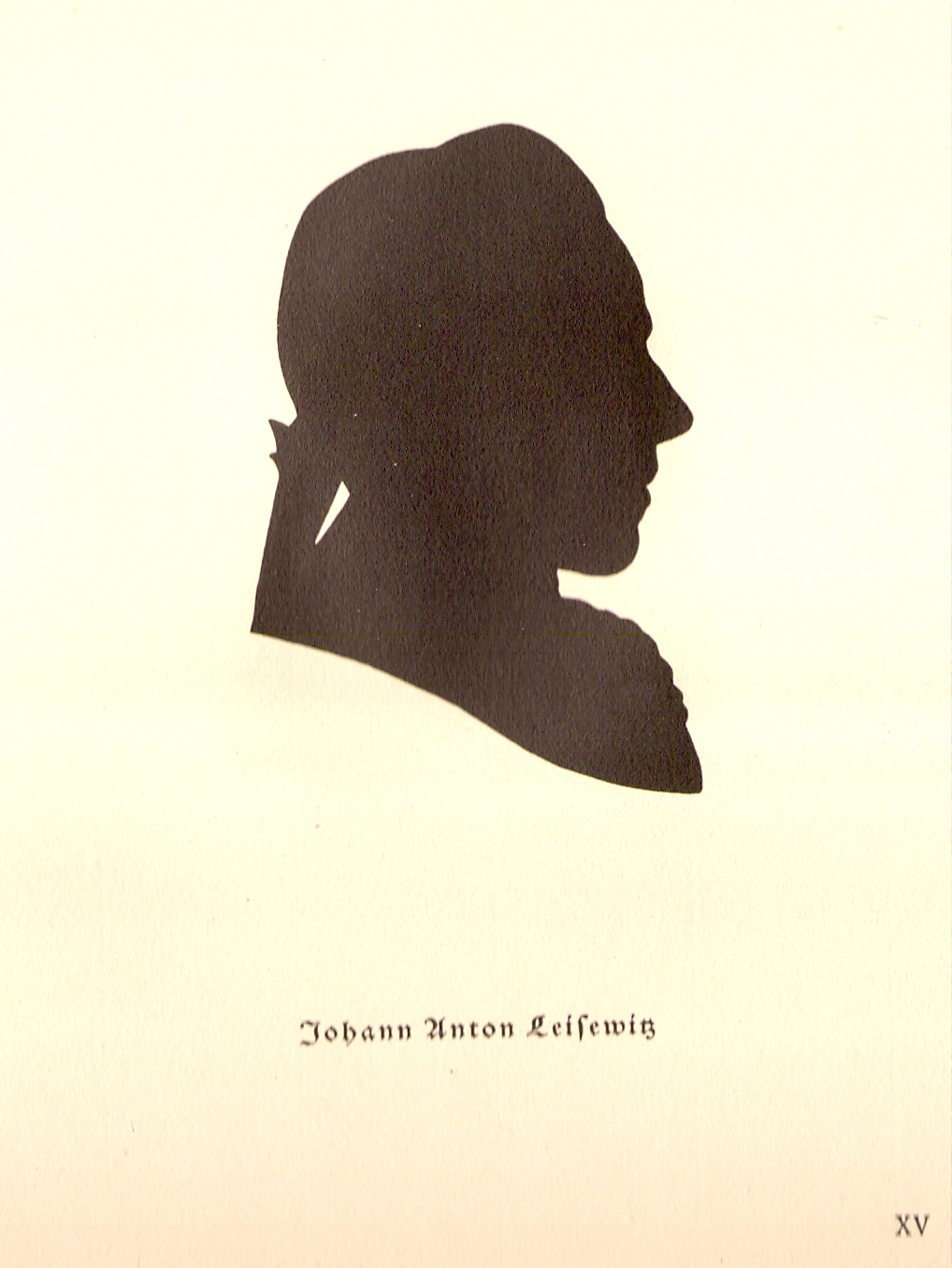 Silhouette (Schattenriss) den Dichter Johann Anton Leisewitz zeigend